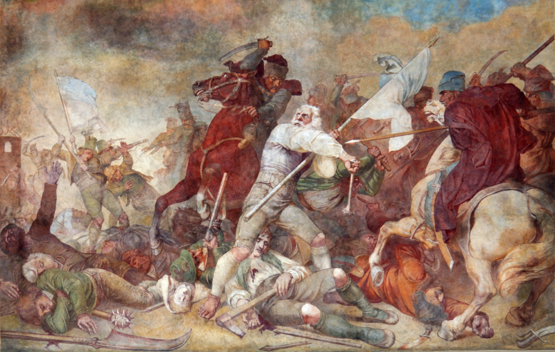 Fresko "Die Sendlinger Bauernschlacht 1705" von Wilhelm Lindenschmit der Ältere an der Alten Pfarrkirche St. Margaret in München-Sendling.